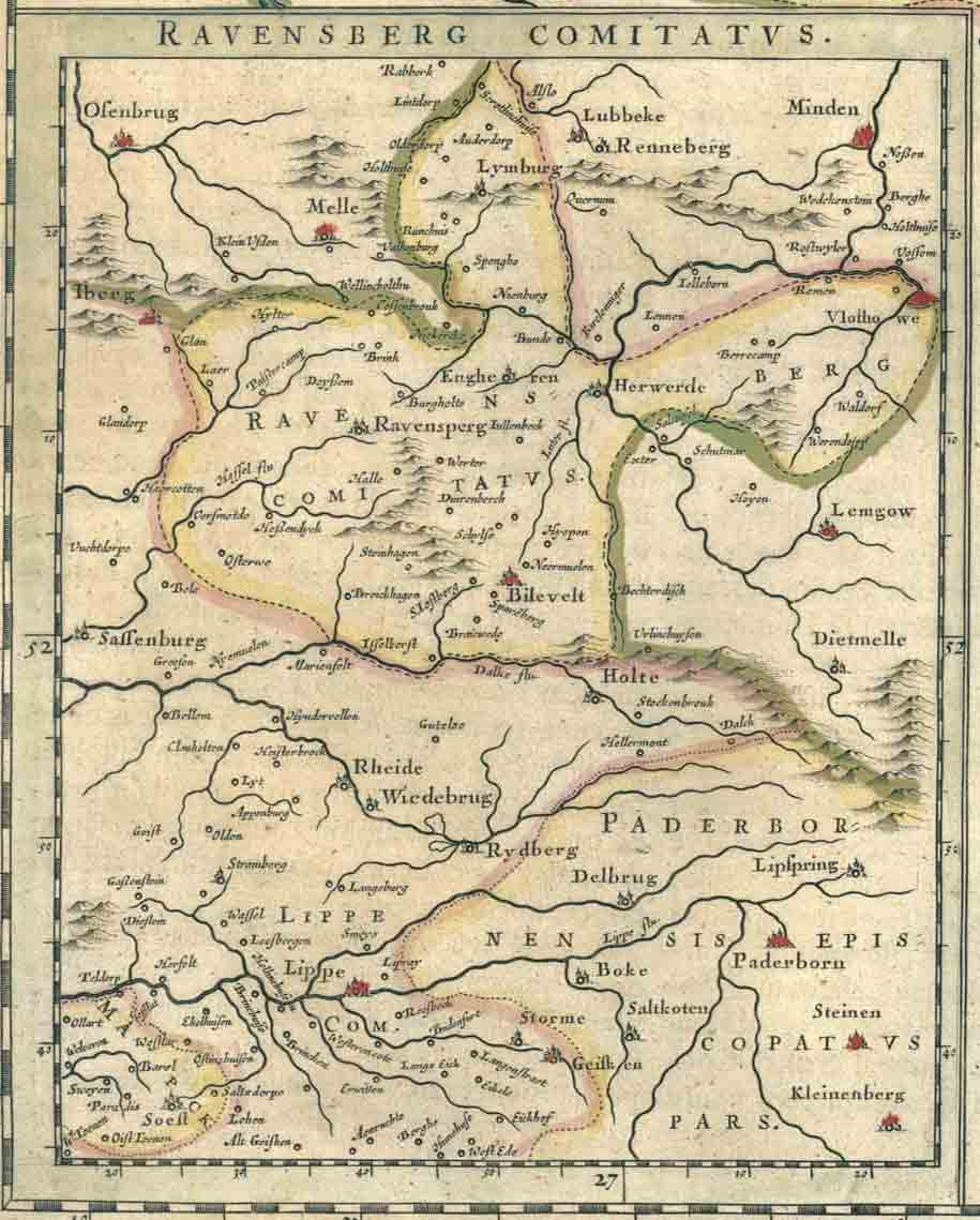 Die Karte "Ravensberg Comitatus", "Grafschaft Ravensberg", ist Teil der Karte "Comitatus Marchia et Ravensberg", "Grafschaft Mark und Ravensberg", aus dem Atlas "Theatrum orbis terrarum, sive, Atlas novus in quo Tabulae et Descriptiones omnium Regionum", übersetzt etwa: "Theater der Welt/Welttheater oder Neuer Atlas mit Karten und Bescheibungen aller Regionen". Hergestellt wurde er von den niederländischen Kartografen und Kupferstechern Willem Janszoon Blaeu and Joan Blaeu. Die Karte stammt aus einer Auflage in lateinischer Sprache, die ab 1645 gedruckt wurde. Schon 1635 gab es einen Vorläufer in niederländischer, deutscher, französischer und lateinischer Sprache. Ab 1662 galt der beständig erweiterte Atlas als Atlas maior, also als wichtigster und Hauptatlas der westlichen Welt. Er ist vor allem als Blaeu-Atlas bekannt. Um die ganze Karte "Comitatus Marchia et Ravensberg" zu betrachten, klicke hier: Den ganzen Atlas kann man sich hier ansehen: Beide Links führen zu Seiten, die von der Universität von Kalifornien, Los Angeles (UCLA), USA, digitalisiert wurden.